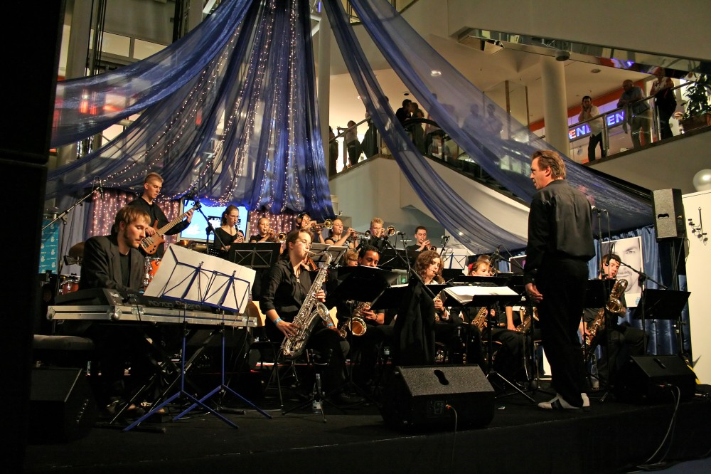 CityJazzNight 2006 in Braunschweig